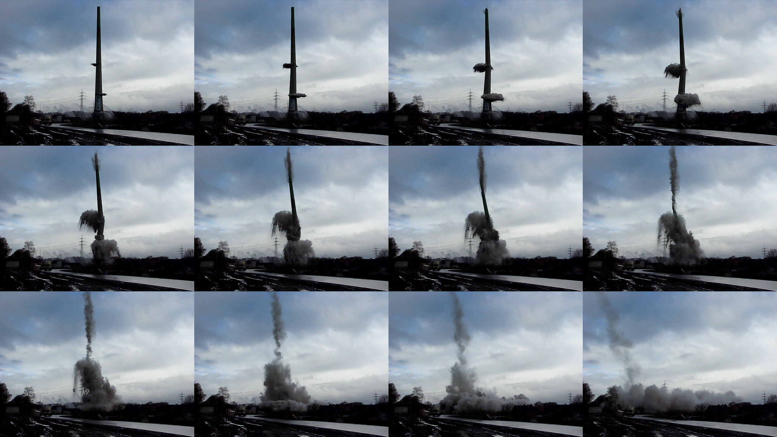 Sprengung des Schornsteins in Castrop-Rauxel